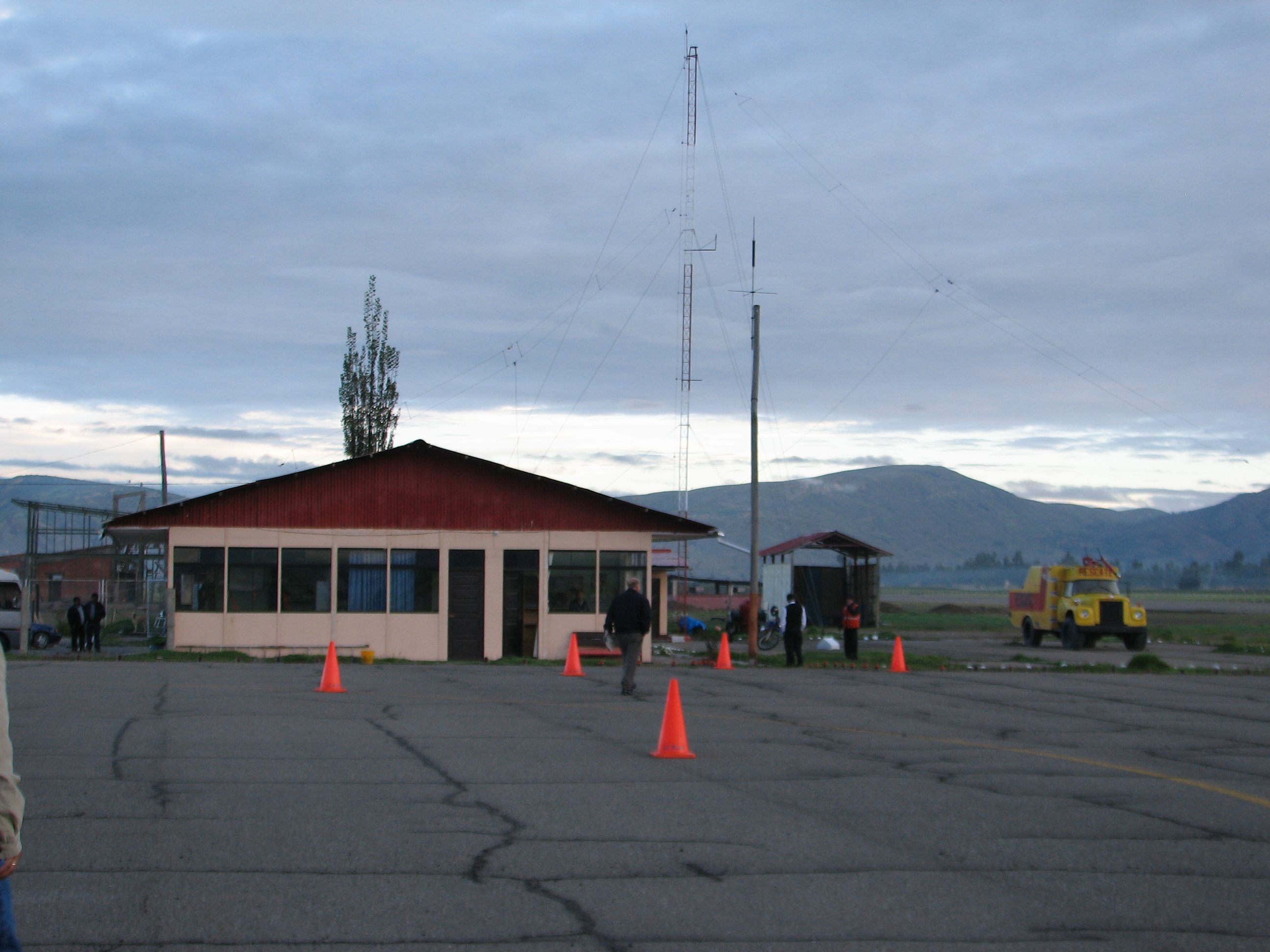 Airport Jauja (JAU/SPJJ) Peru (Jauja/Jauja/Junin)